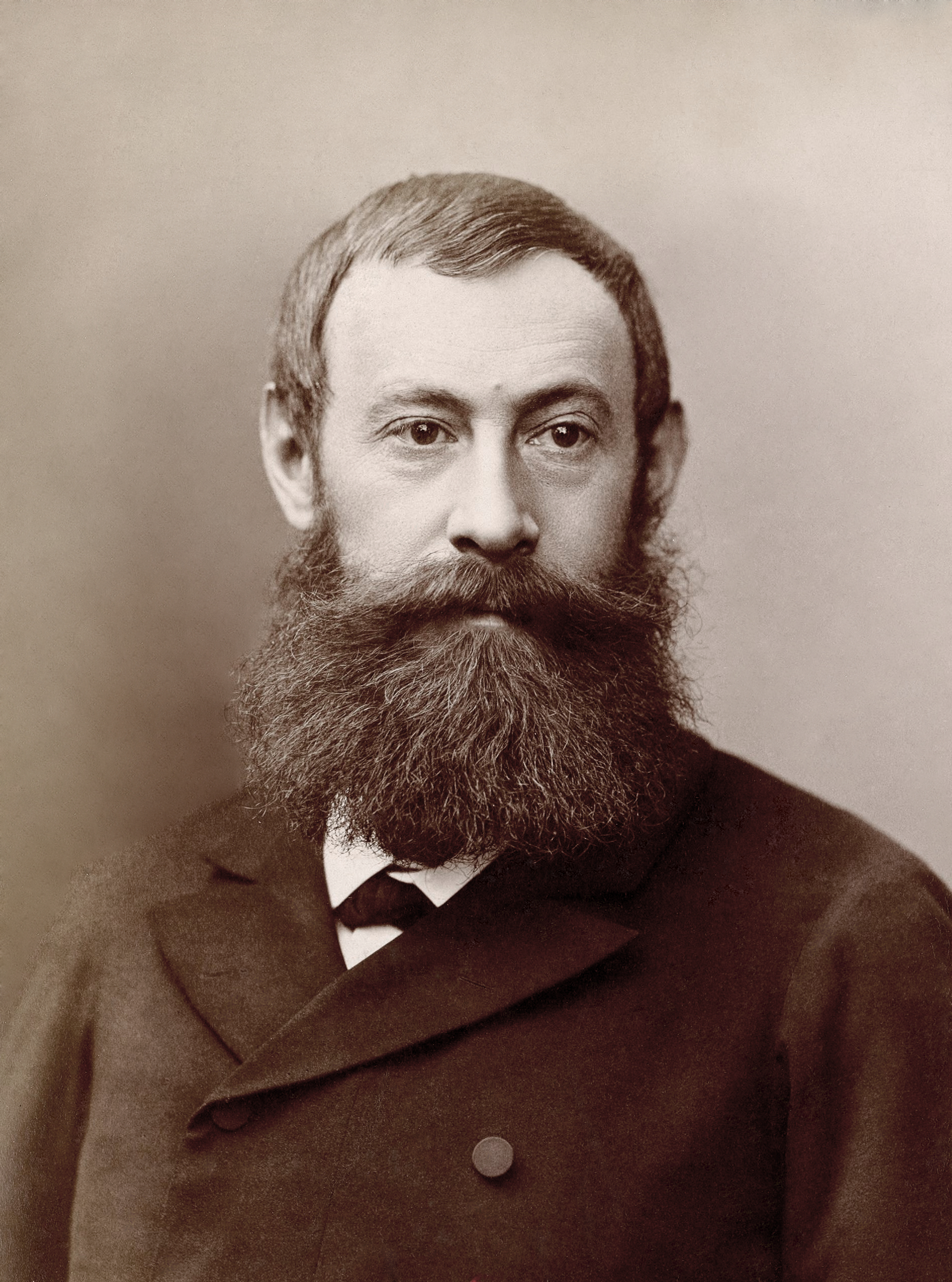 Daniel Wilson (1840 - 1919), parlementaire français. Profitant de sa position de gendre du président Jules Grévy, il fut un des responsables du trafic de décorations en 1887, qui amena le chef de l'Etat à la démission.